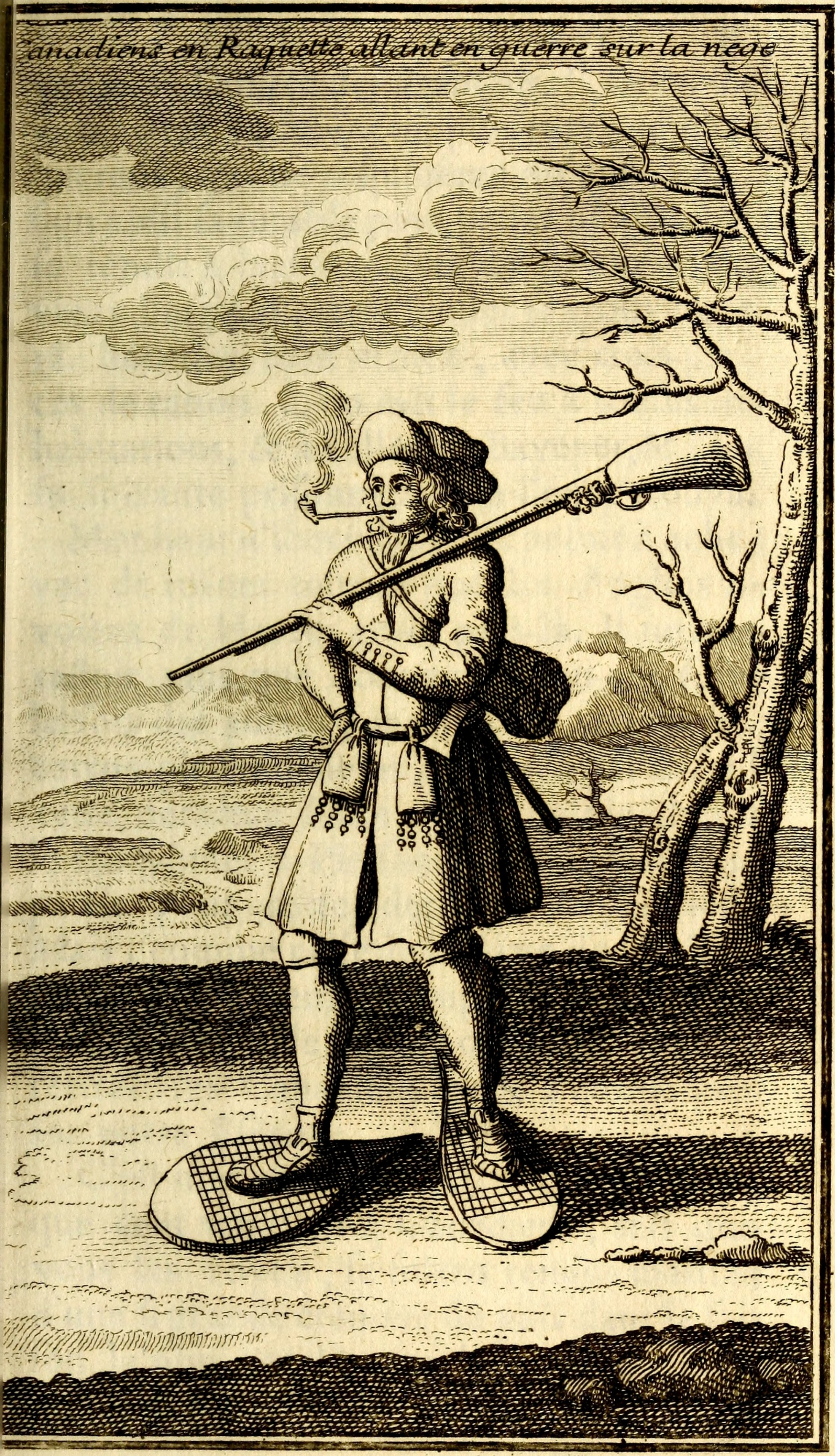 Canadiens en raquette allant en guerre sur la neige. Dessin réalisé pour illustrer les campagnes de d'Iberville à Terre-Neuve et dans la baie d'Hudson pendant la guerre de la Ligue d'Augsbourg (1688-1697). Dessin publié en 1722 par Claude-Charles Bacqueville de La Potherie dans son livre l'Histoire de l'Amérique septentrionale. Anglais : Representation of a French Canadian in war dress during the winter (soldier or militia). Drawing made to illustrate the fighting in Newfoundland and Hudson Bay during the War of the League of Augsburg (1688-1697). Drawing published in 1722 then in 1753.